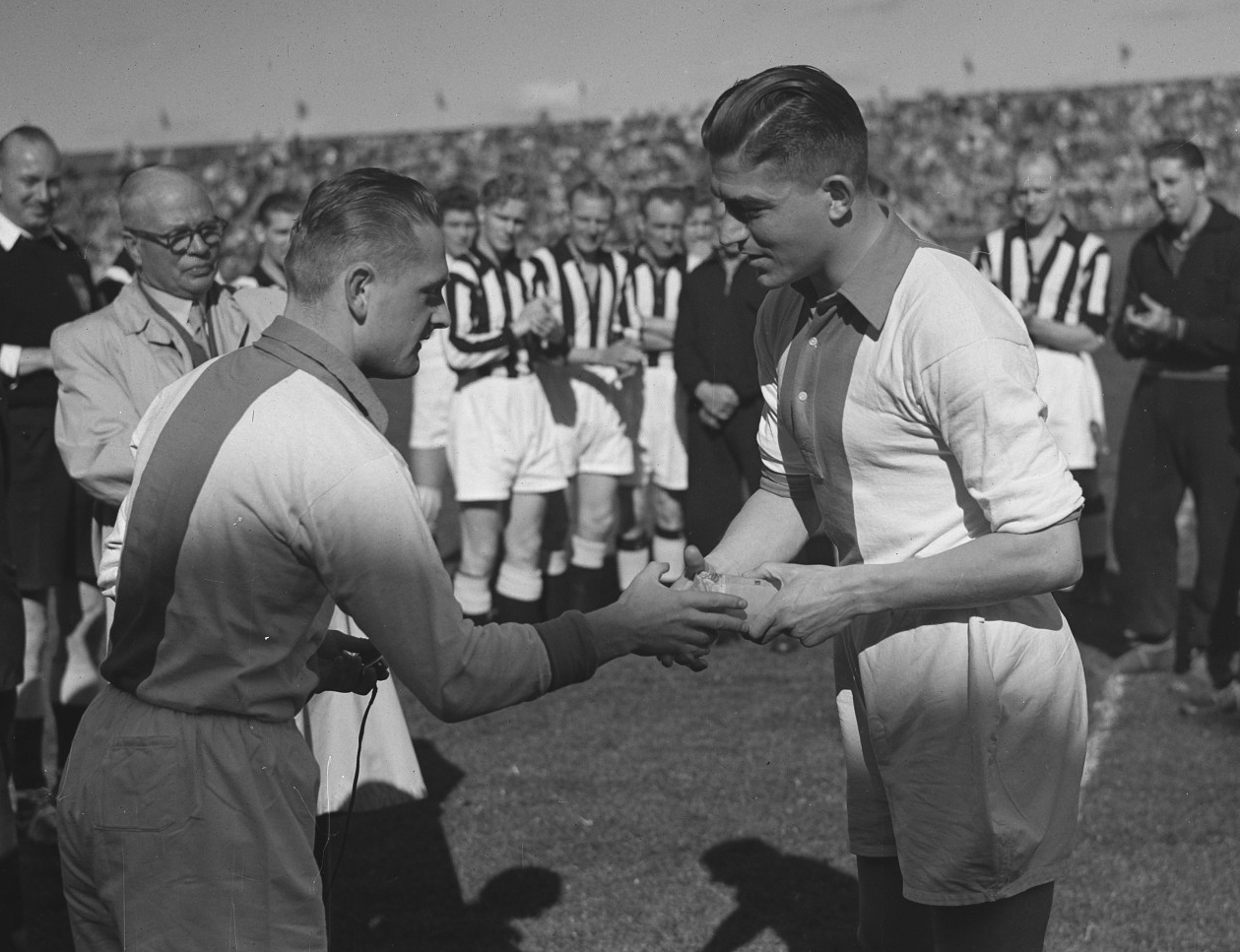 Voetbal Ajax tegen Heracles (1-0). Huldiging Jan Potharst.